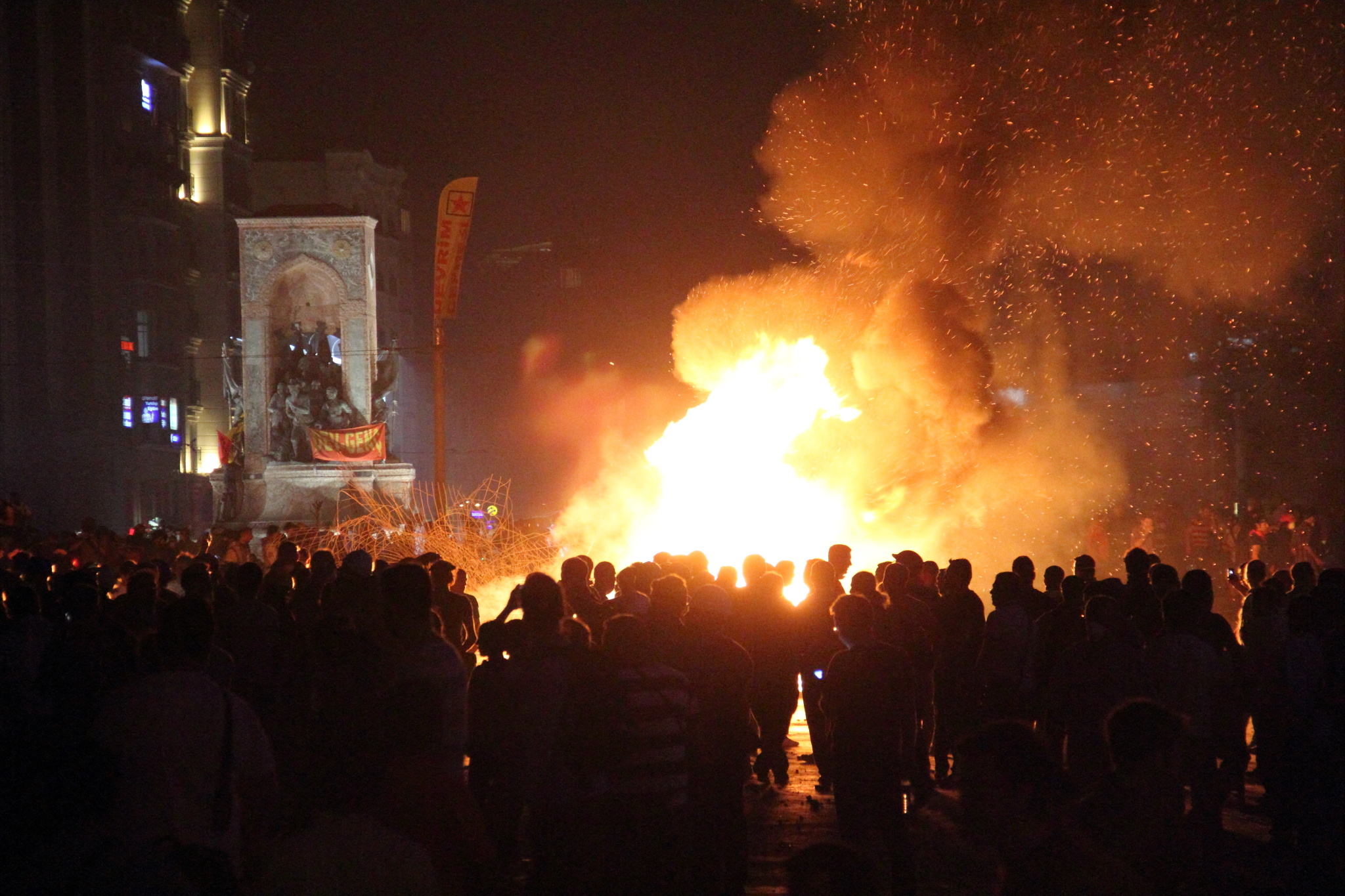 Gezi Parkı Müdahale